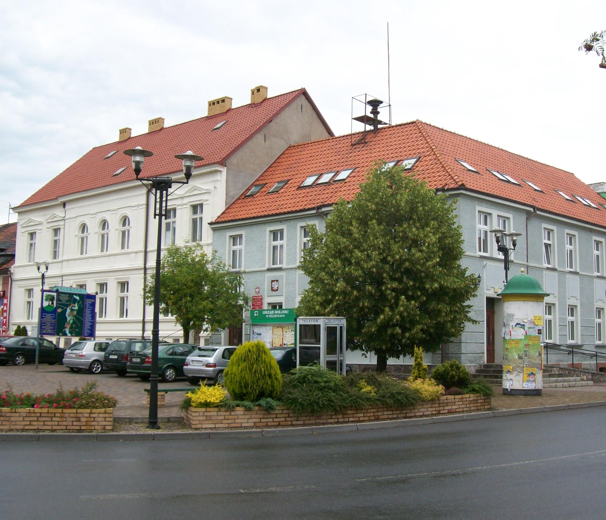 Urząd Miasta i Gminy Pełczyce.